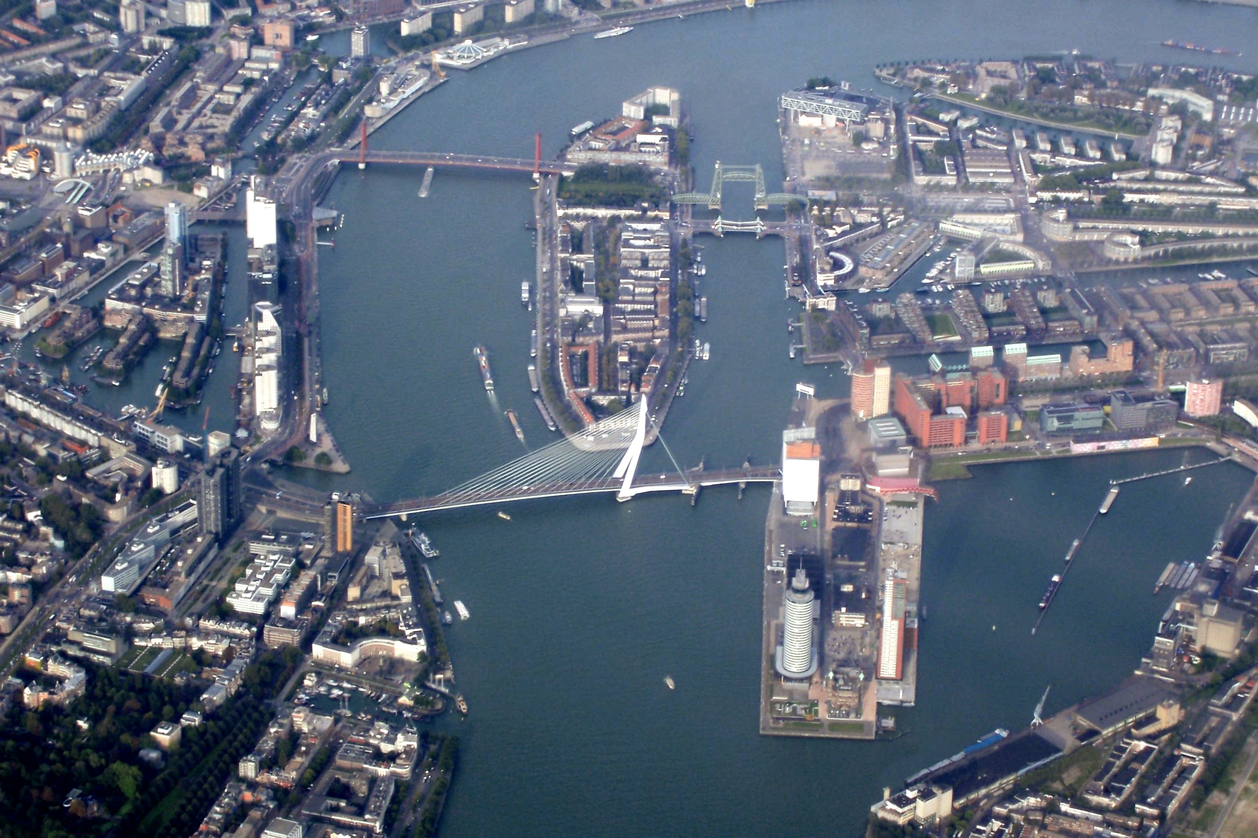 Categorie:Luchtfoto Categorie:Lucht-satelietfoto Rotterdam (Original text: Luchfoto van Rotterdam / Erasmusbrug / Kop van Zuid)